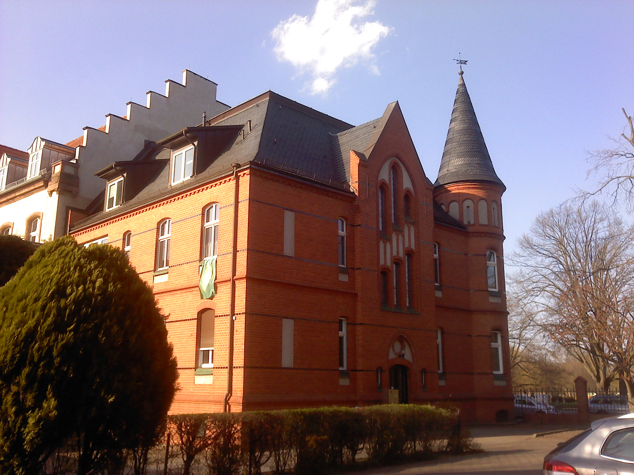 St. Josef-Kirche, Köpenick